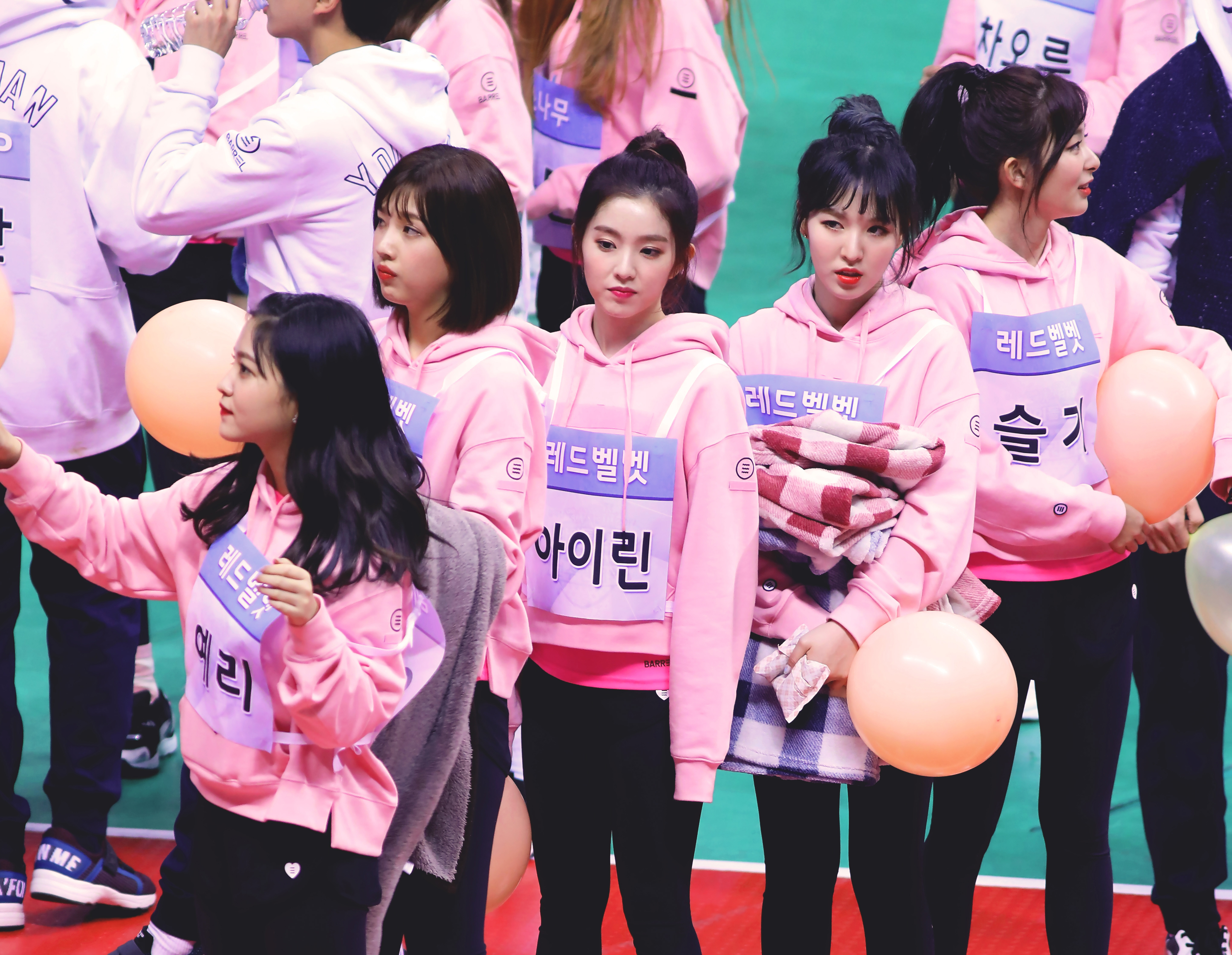 170116 레드벨벳 아육대